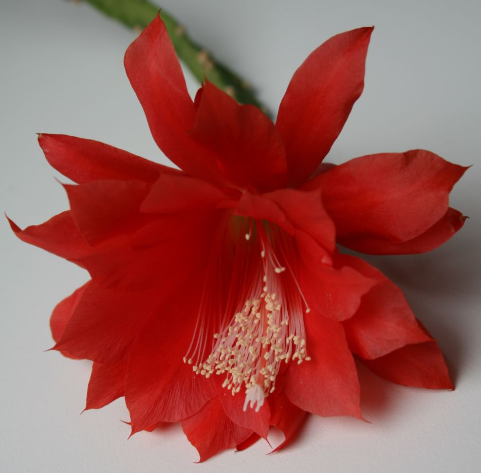 Disocactus X hybridus epifita kaktuszhibrid virága